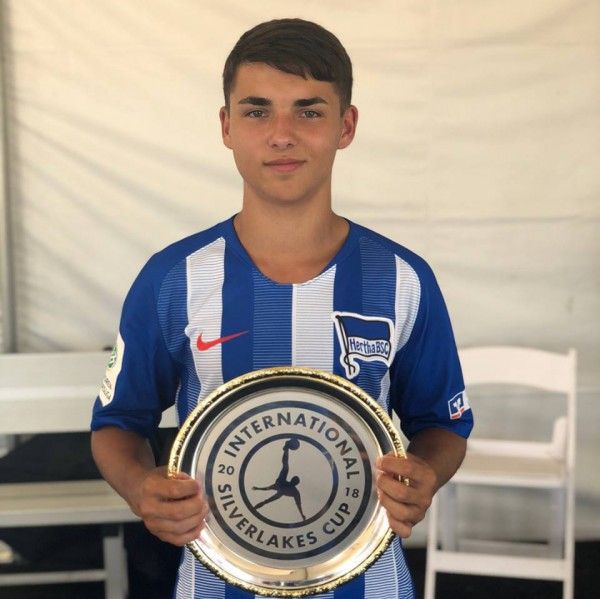 Жан-Рафаэль Щербаковский в Калифорнии на Международном Кубке Silverlakes.